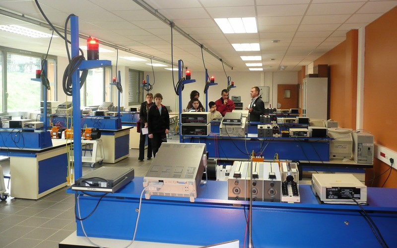 Salle d'électro-technique (2), lycée Claude (Saint-Chamond).